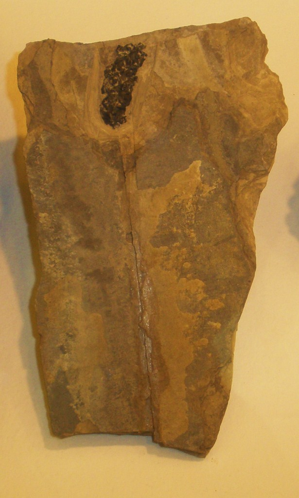 Fossil of Neusticosaurus, an extinct reptile. - Took the photo at Museo dei Fossili di Besano